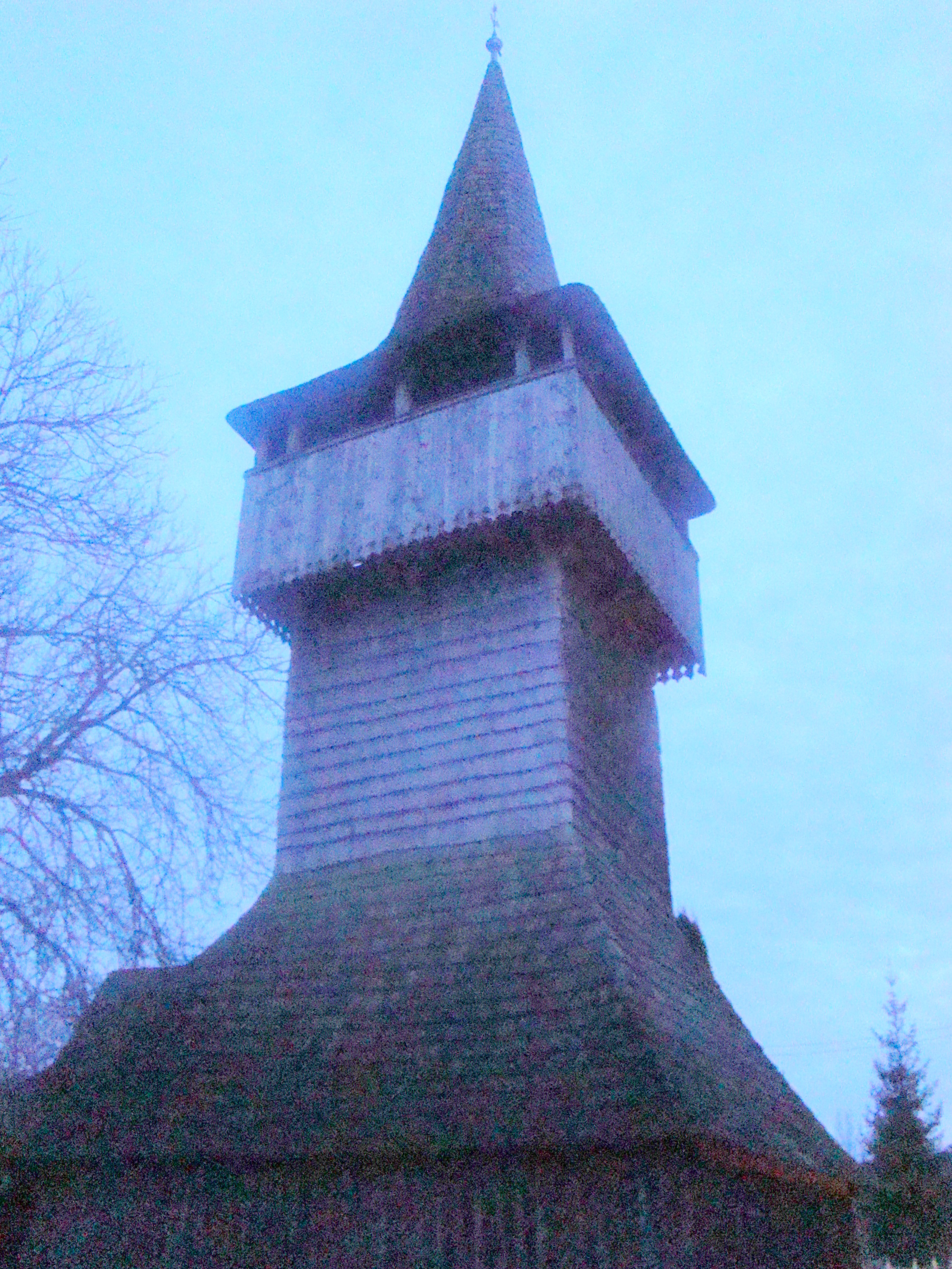 Clopotniță de lemn a bisericii reformate din Mineu, Sălaj 02